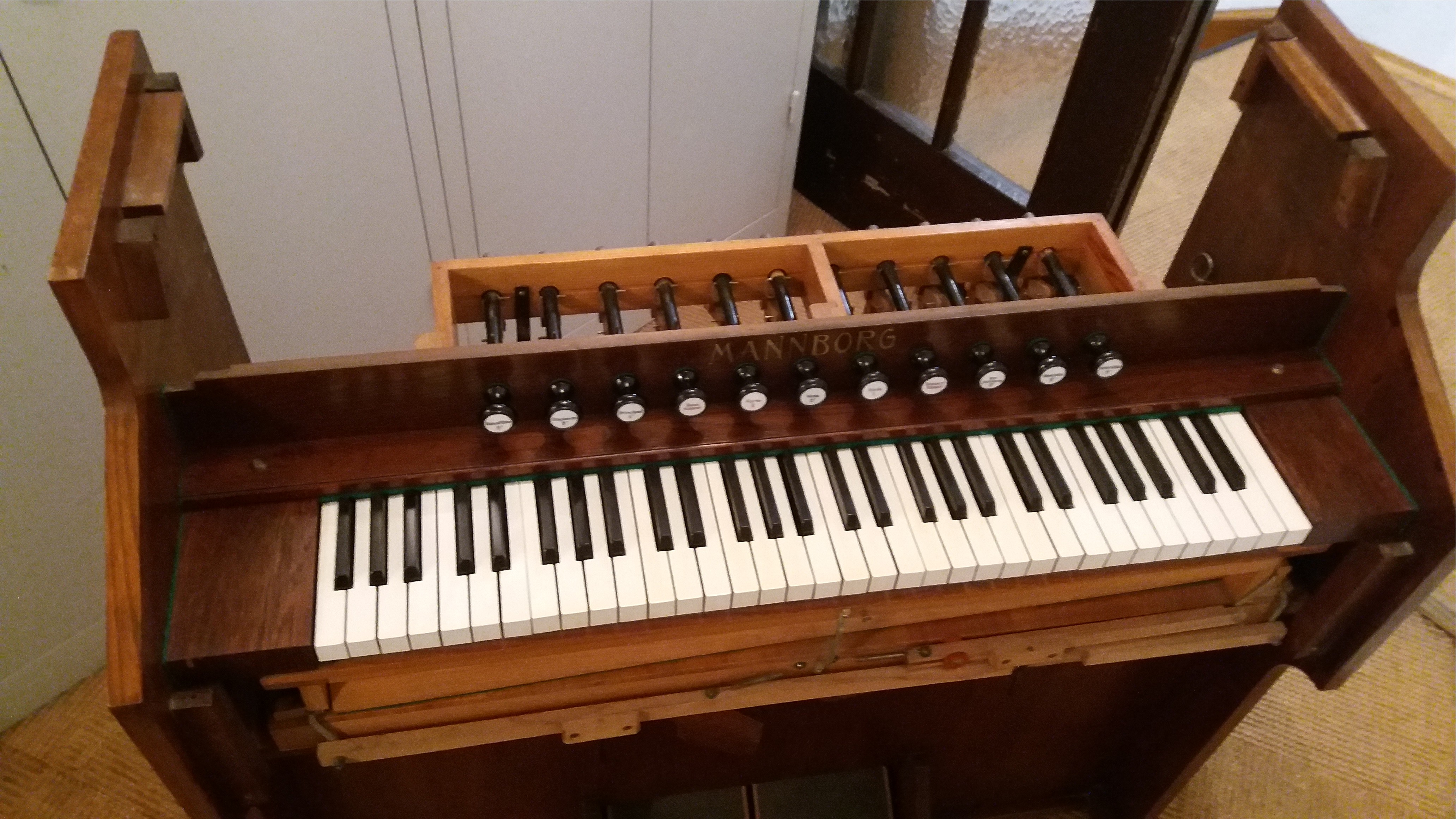 Harmonium; Aufbau: Mit Spielwerk und Registriereinrichtung